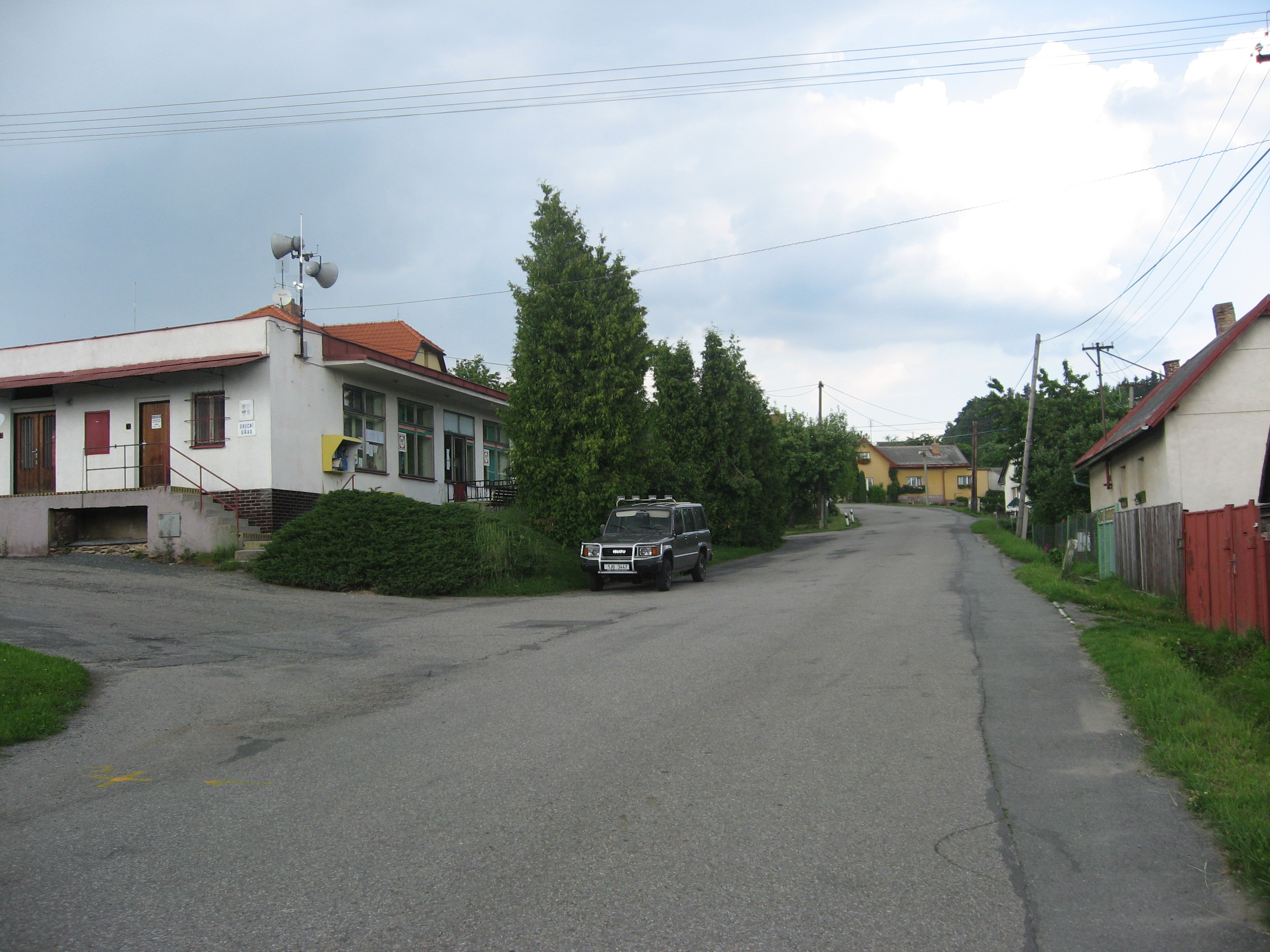 Vystrkov